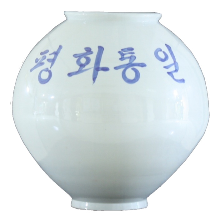 ◦ ｢통일항아리｣는 통일준비의 상징입니다. 통일은 반드시 올 것이기 때문에 통일 준비를 지금부터 차근 차근 해 나가야 합니다. 말로만 하는 통일이 아닌 실질적으로 통일을 준비하기 위해서는 무엇보다도 통일에 대한 국민적 의지가 중요합니다. 두번째로 통일과정에 비용이 필요하기 때문에 통일재원을 마련해야 됩니다. 세번째, 통일외교를 강화해야 합니다. 통일의 당사자는 남북한 이지만 통일을 위해서는 주변국과 국제사회의 지지와 협력이 필수적이기 때문입니다. 네번째, 분단이재민을 포용해야 합니다. 분단이재민은 이산가족, 북한이탈주민, 납북자와 국군포로 가족 등 분단으로 인해 상처 받고, 그 상처를 안고 살고 있는 사람들을 말합니다. 우리 사회가 이들을 적극적으로 보듬는 노력이 필요합니다. 다섯번째로, 통일에 대비하여 법과 제도를 미리 준비해야 합니다. 이러한 실질적 통일준비의 상징이 바로 "통일항아리"입니다. 옛날 지혜로운 어머니들은 부엌에 항아리를 하나 두고 밥을 지을실 때마다 쌀 한줌을 덜어 항아리에 담아두었다가 어려움이 닥쳤을 때 요긴하게 쓰곤 하셨습니다. 이러한 지혜를 빌려 본 것이 ｢통일항아리｣입니다. 분단으로 인한 비용이 통일비용보다 크고, 통일이 되면 많은 편익이 발생하지만, 통일과정에 돈이 드는 것은 사실입니다. 반드시 올 통일에 실질적으로 대비하는 차원에서 통일시기에 필요한 재원을 비롯하여 통일준비를 지금부터 실질적으로 해 나가자는 취지가 바로 ｢통일항아리｣입니다. ｢통일항아리｣에는 통일재원 뿐만 아니라 우리 국민들과 세계에 널리 퍼져 살고 있는 우리 동포들의 통일에 대한 열망과 정성도 담길 것입니다. 이를 통해 우리 국민들의 자신감과 책임감이 커질 것이고, 북한 동포들과 국제사회에 우리의 통일의지를 분명하게 각인시킬 수 있을 것입니다. ◦ 류우익 통일부 장관이 백산 김정옥 선생과 함께 통일항아리를 완성하였습니다. 통일준비의 상징물인 ｢통일항아리｣를 구체적으로 형상화하여 국민의 이해를 돕고자 실제 ｢통일항아리｣를 제작하여 국민에게 제시하였습니다. 류우익 통일부 장관은 중요 무형문화재 105호 사기장 백산 김정옥 선생과 함께 통일항아리를 제작하였습니다. 항아리 제작을 위하여 류우익 통일부 장관은 수차례 문경 영남요를 방문하여 작업에 직접 참여하였으며, 40여일 만인 2012년 6월 23일 통일항아리를 완성하였습니다. 완성된 통일항아리는 높이와 좌우 폭이 50cm 정도의 백자 달항아리로 ‘평화통일’이라는 푸른색 글씨가 적혀 있습니다. 조선 전래의 달항아리 제작기법으로 윗부분과 아랫부분을 따로 만든 후 두 부분을 접합하여 구웠는데, 이는 분단된 남북이 다시 하나로 이어지는 의미를 상징합니다. 제작된 통일항아리는 정부서울청사 등에서 전시하는 등 통일준비를 위한 국민들의 의지와 행동을 모으는 상징으로 활용하고 있습니다. ◦ 대통령, 국회의장, 통일부 장･차관 등 고위공무원이 통일항아리에 기부하였습니다. 이명박 대통령은 2012년 7월 16일 민간단체인 ｢통일을 생각하는 사람들의 모임｣이 주관하는 통일기금 모금운동에 금일봉을 기부하였습니다. 이와 함께 강장희 국회의장, 통일부 장･차관 등 고위공무원 역시 월급을 모아 성금을 통일항아리에 기부하였습니다. 이뿐만 아니라 전국의 각계각층의 국민들이 통일항아리에 정성을 모아주고 있습니다.